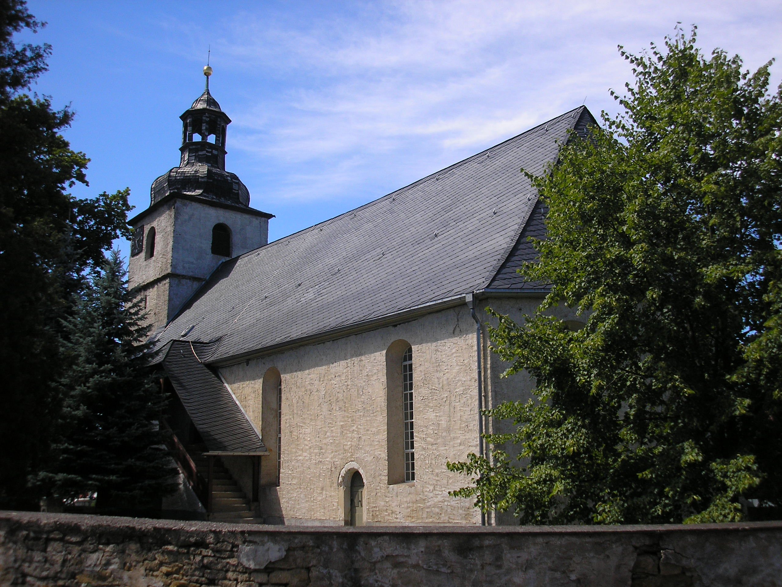 Die Kirche in Berlstedt (Thüringen).